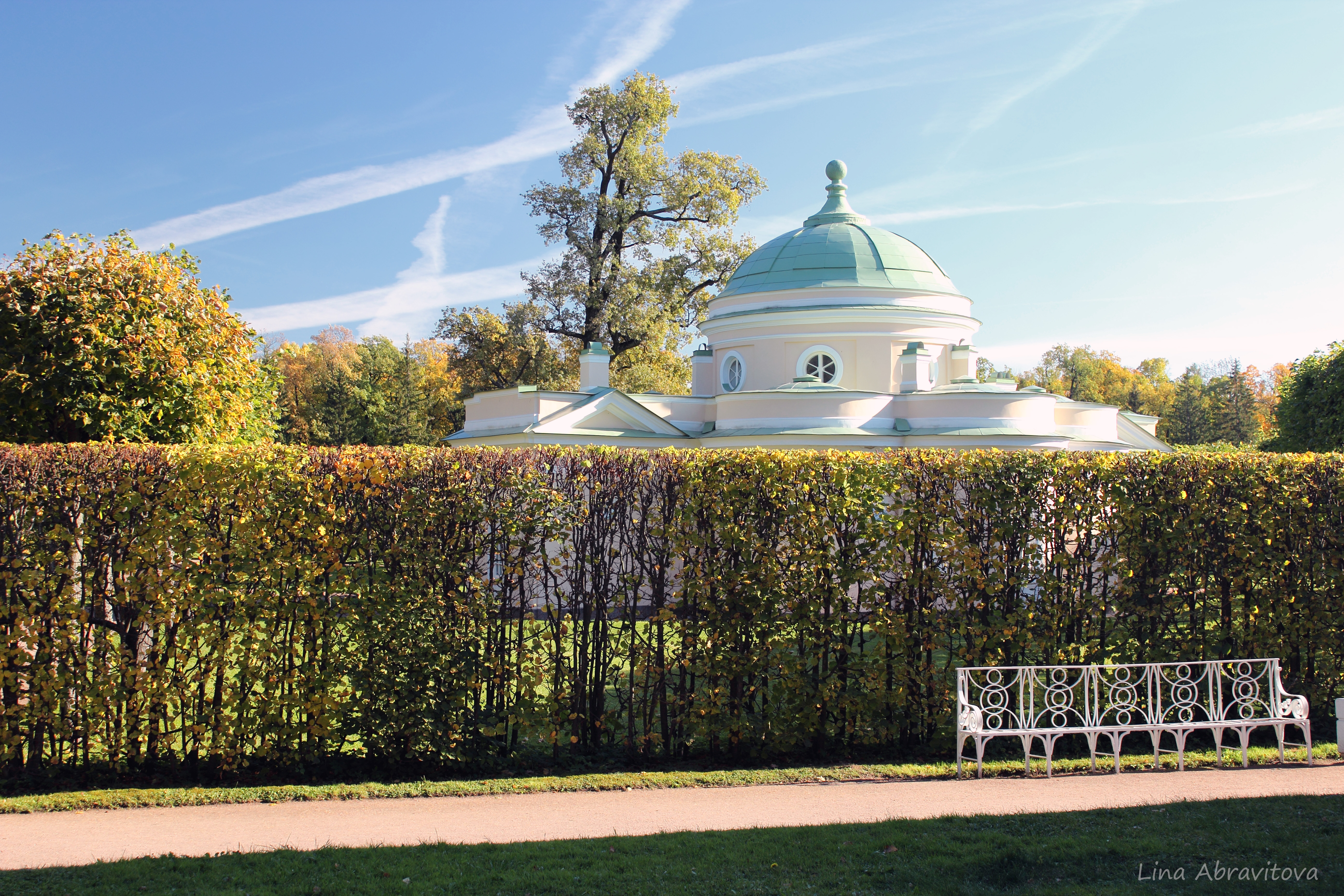 Павильон Нижняя ванна (Санкт-Петербург и Лен.область, Пушкин, регулярная часть парка)